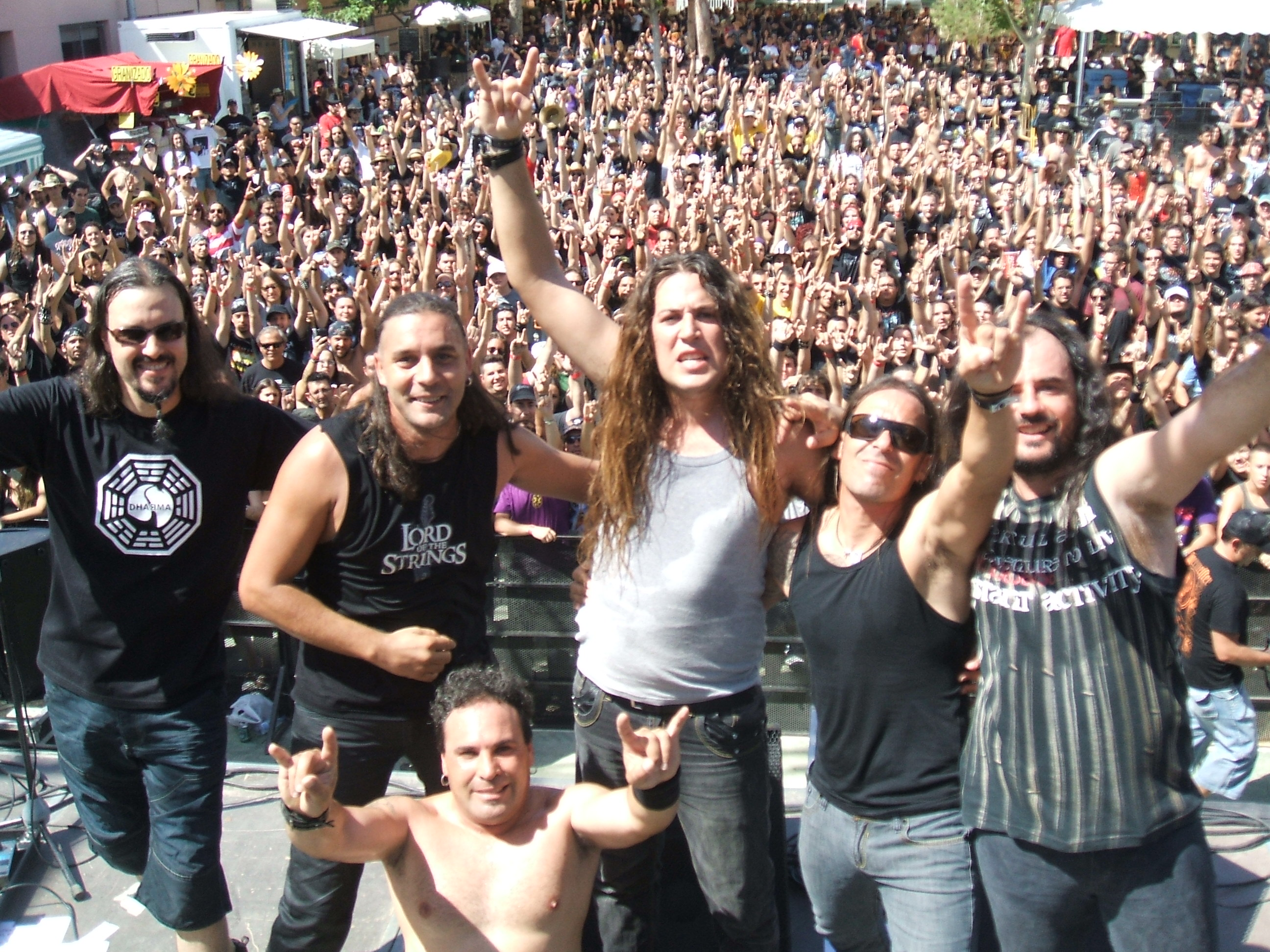 llenazo en el leyendas 2011